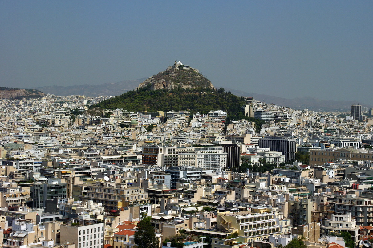 Lykavittos-Hügel von der Akropolis gesehen